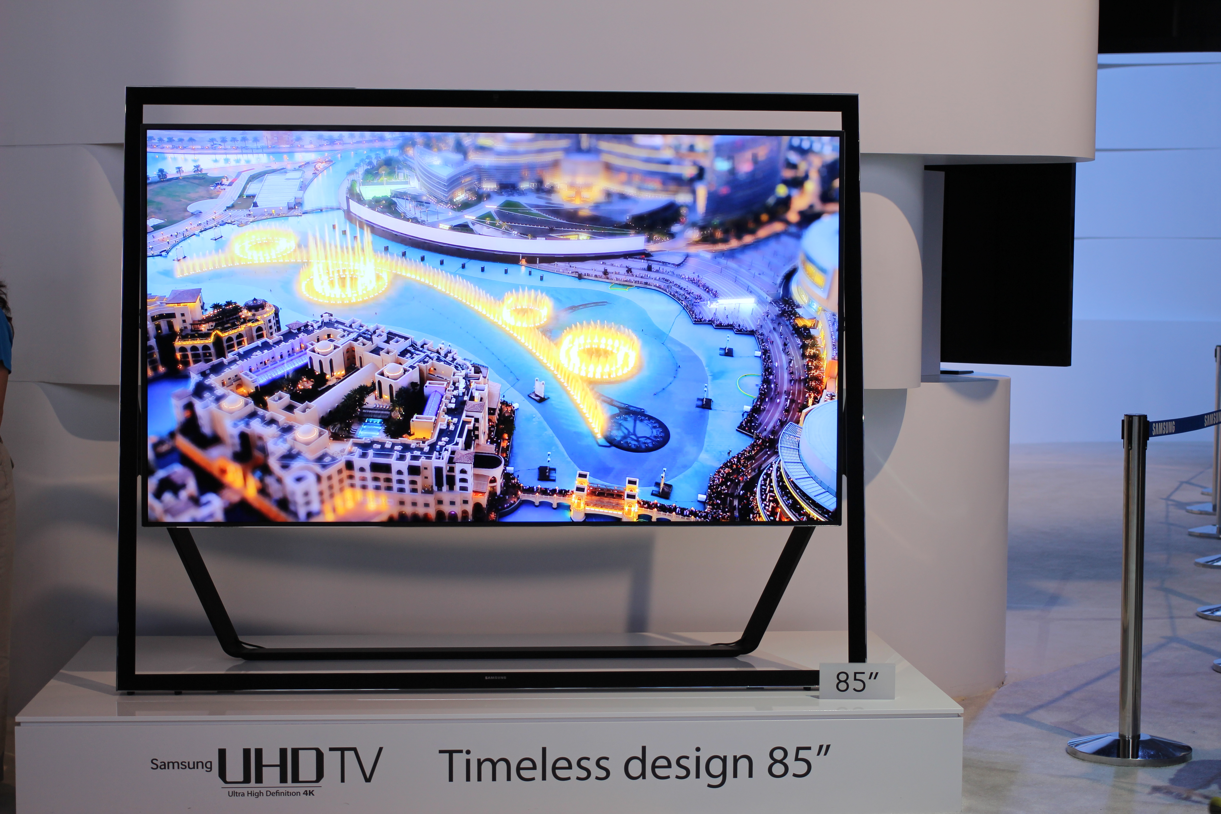 Samsung UHD TV 85""